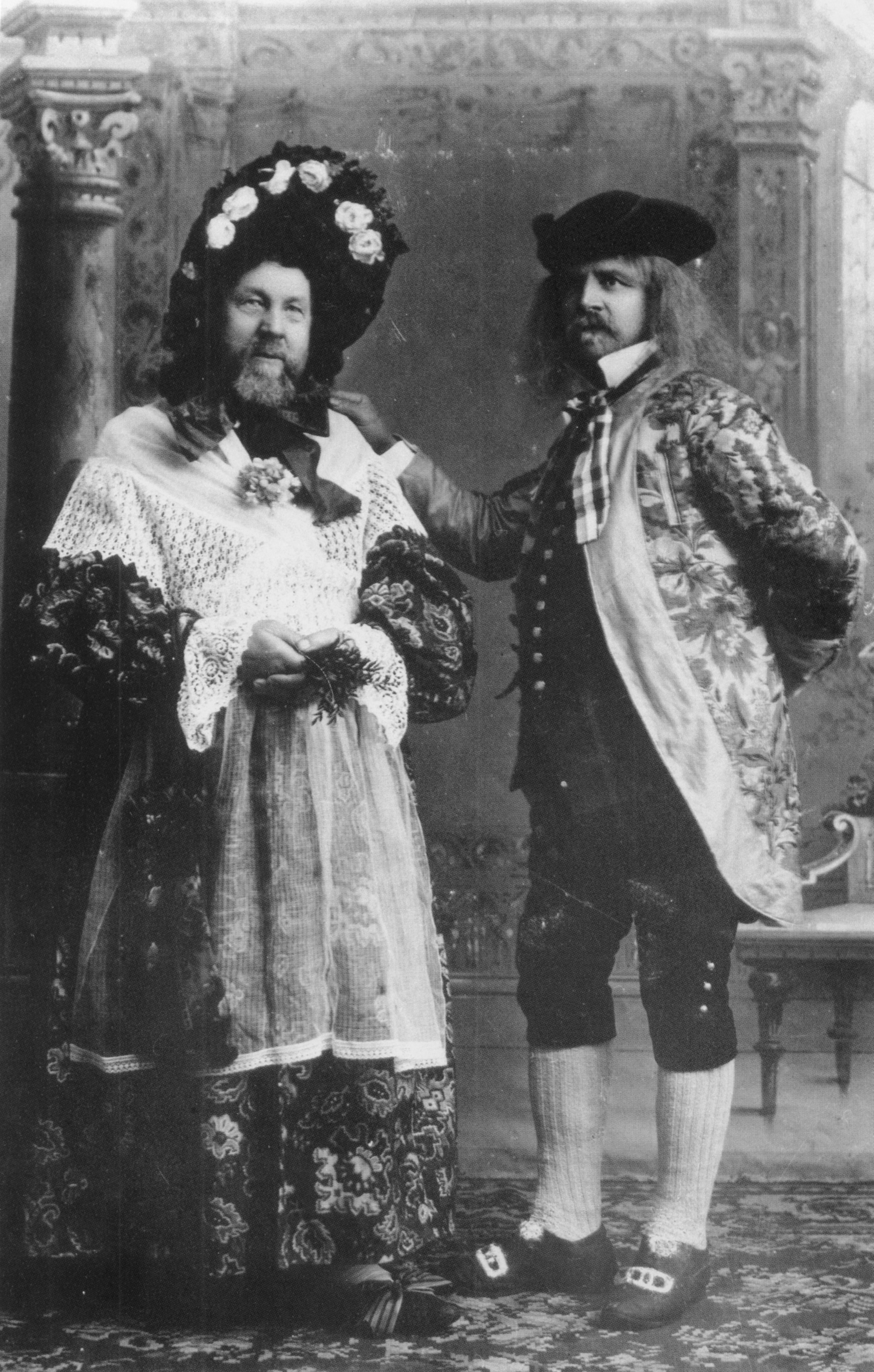 Überlinger Narreneltern um 1880 (erstes Foto), rechts Narrenvater Alexander Lauterwasser, links Narrenmutter Ludwig Stephan